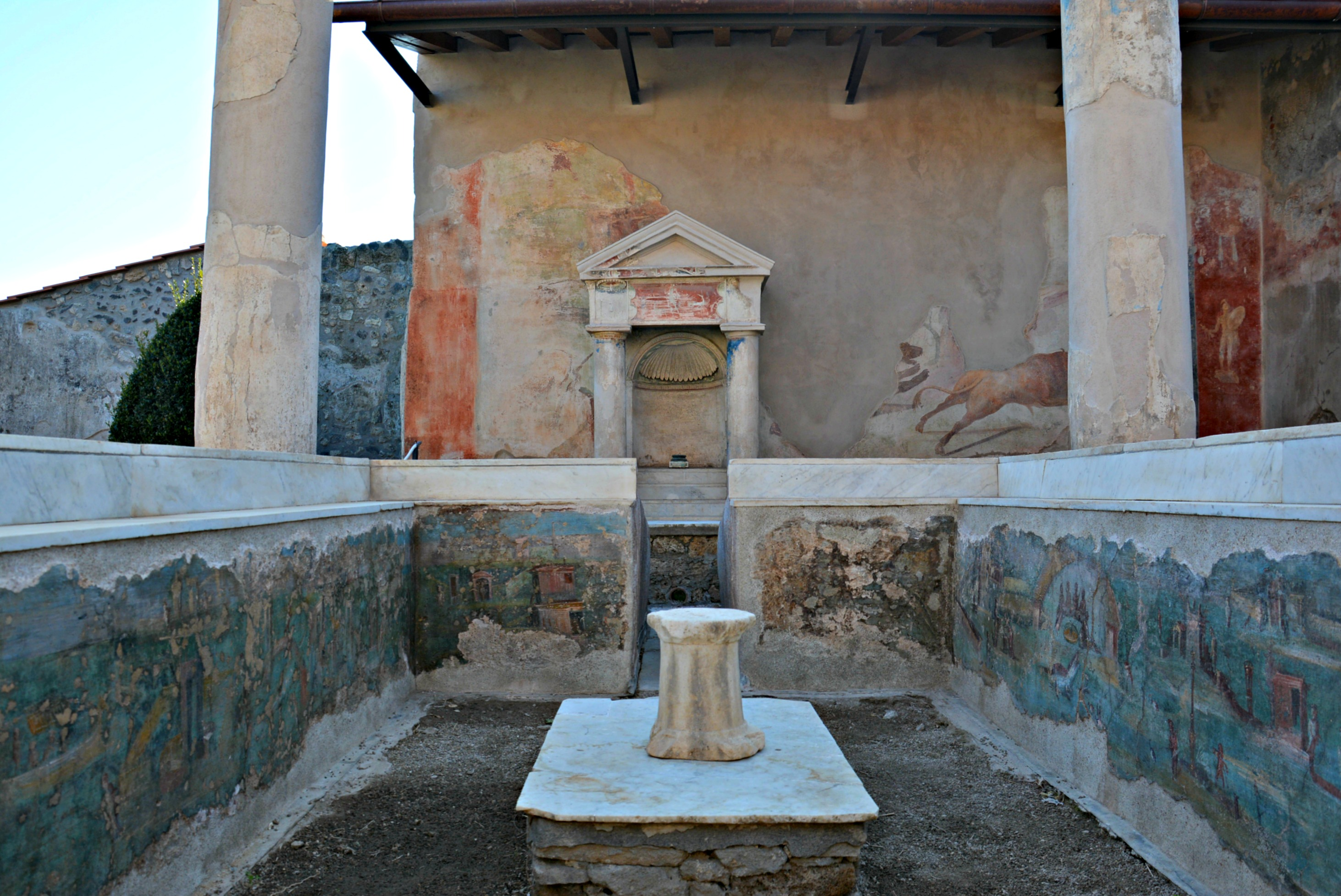 Vedi titolo